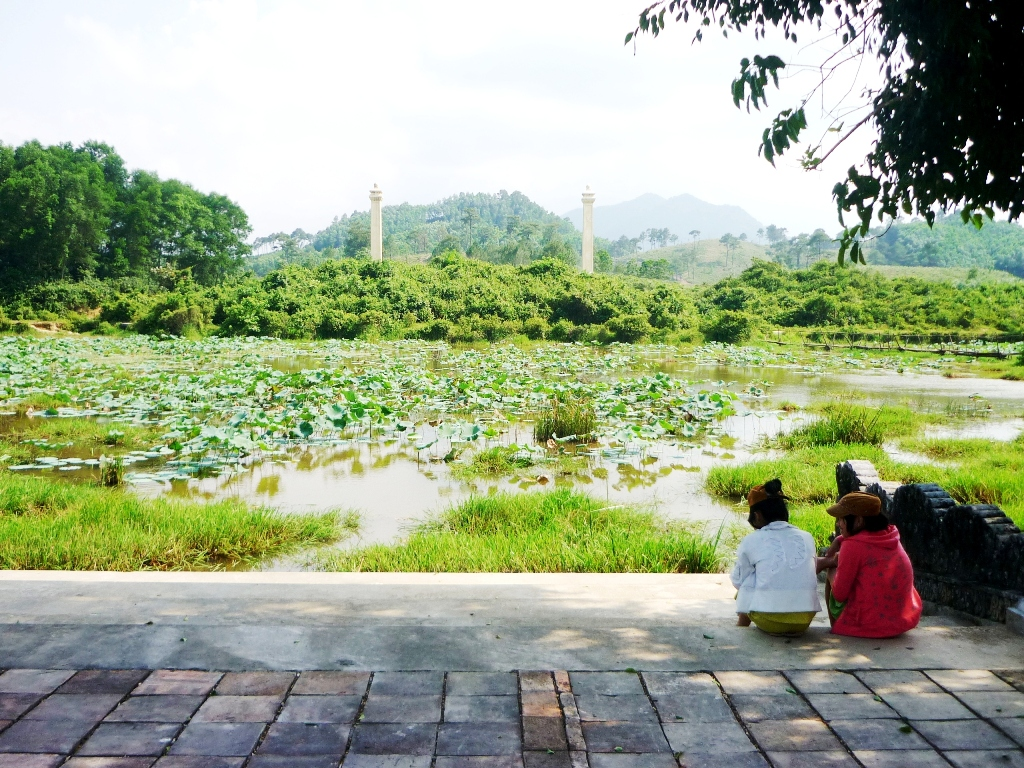 Thể loại:Nhà Nguyễn Thể Loại:Di tích cố đô Huế Thể loại:Lăng tẩm các Vua chúa Nguyễn Thể loại:Di tích ngoài Kinh Thành Huế